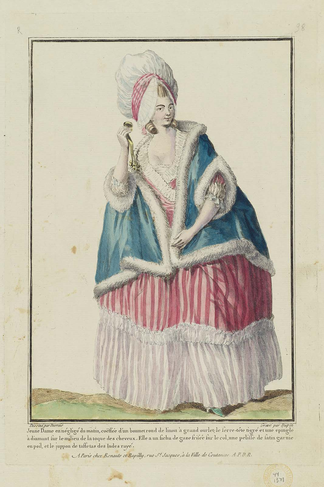 Plate 98 from Gallerie des Modes et Costumes Français. 17e. Cahier des Costumes Français, 11e Suite d'Habillemens à la mode en 1779.